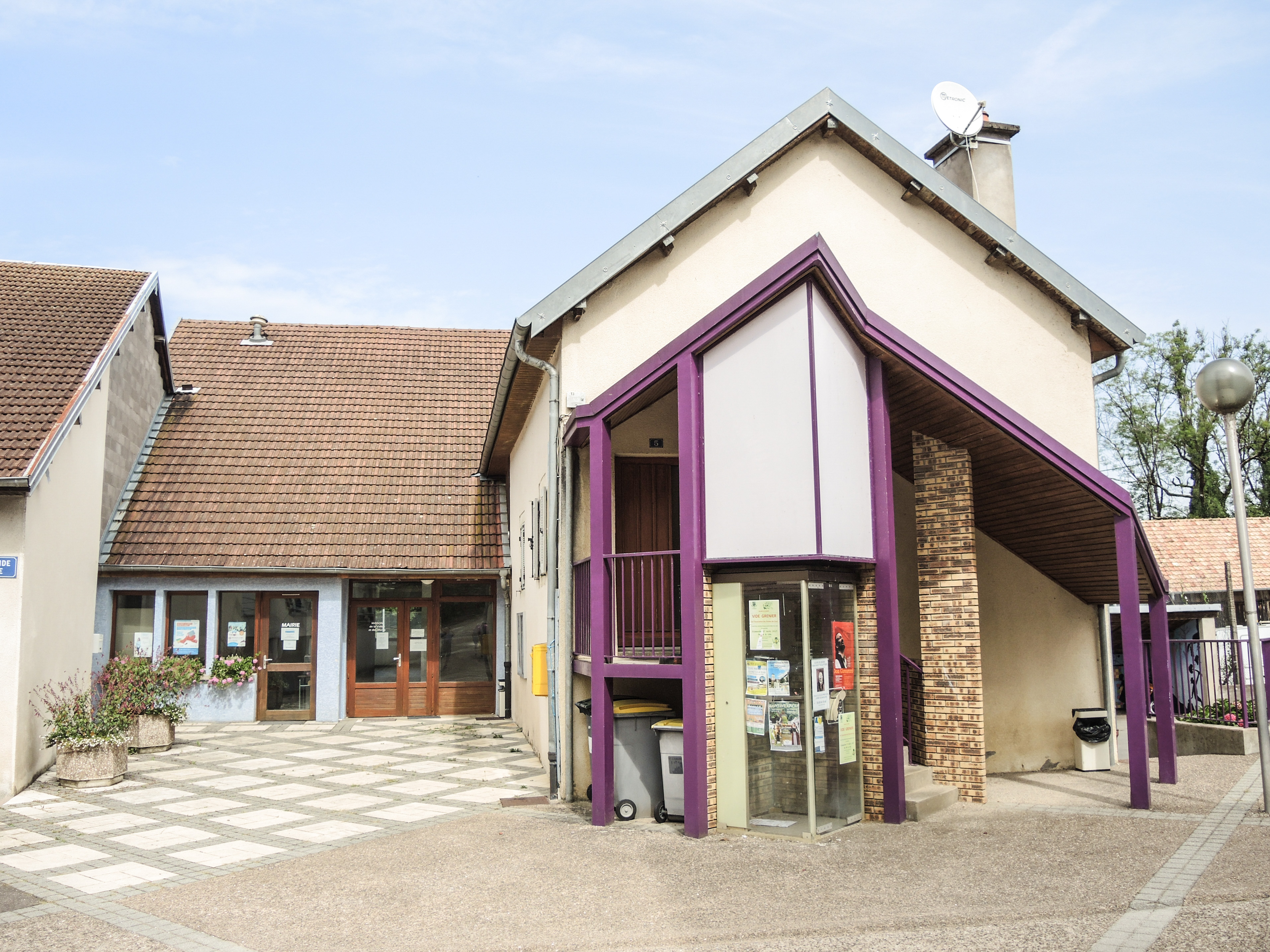 Mairie de Pont-les-Moulins. Doubs